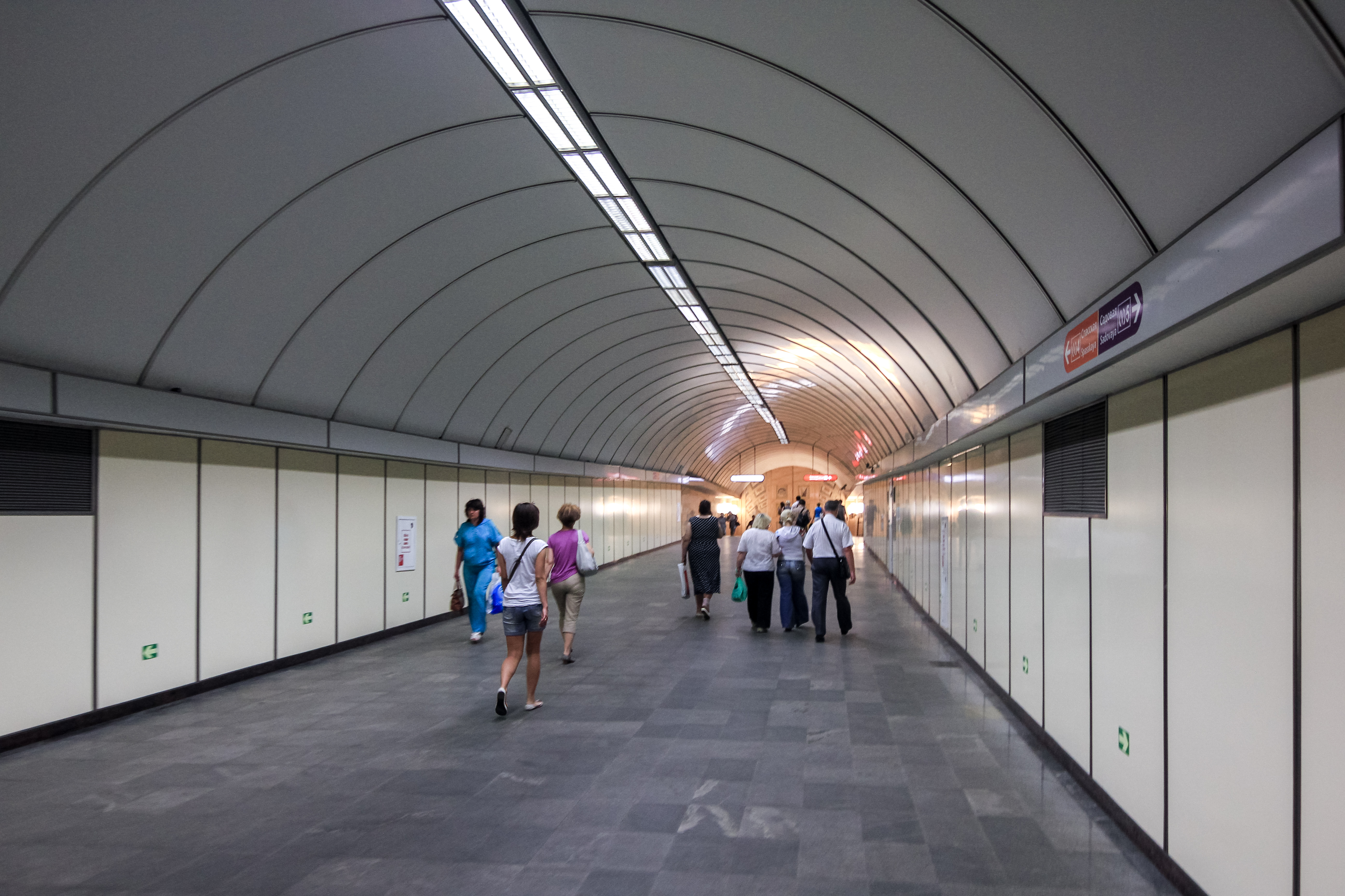 Садовая (станция метро)